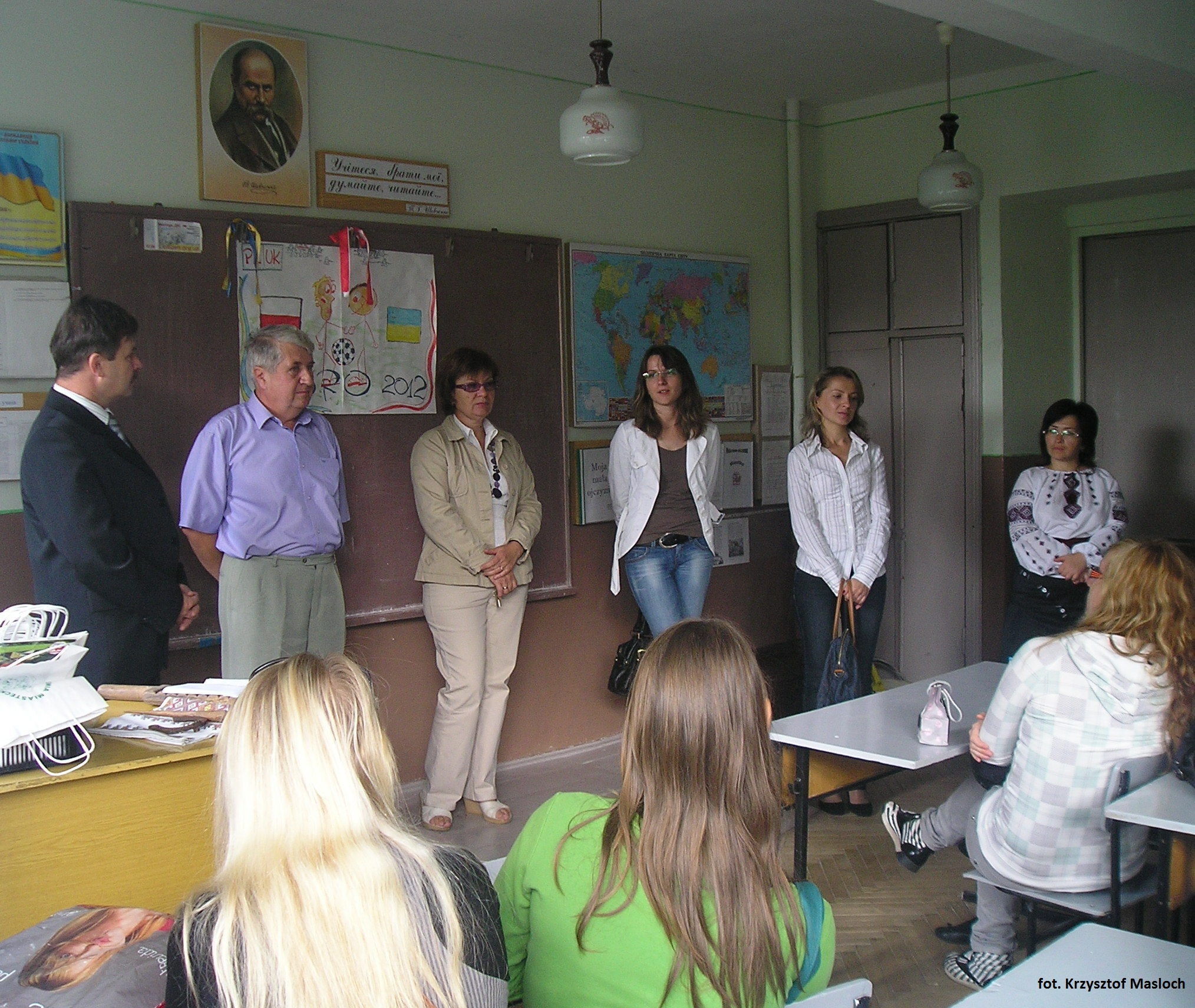 Polsko-Ukraińska Wymiana Młodzieży między I Liceum Ogólnokształcącym im. Adama Mickiewicza w Miastku a Szkołą Średnią nr 38 we Lwowiena zdjęciu m.in. pan Bogusław Szkwarek, pan Wasyl Hawrylyszyn, pani Maria ŁawerZdjęcie wykadrowano